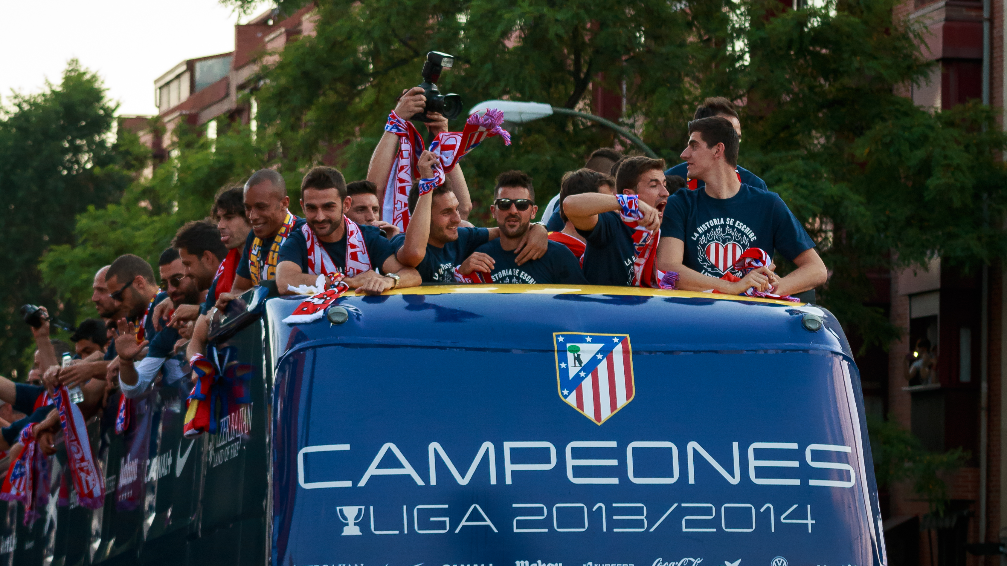 Festejos del Atlético de Madrid tras ganar la Liga BBVA 2013/2014.